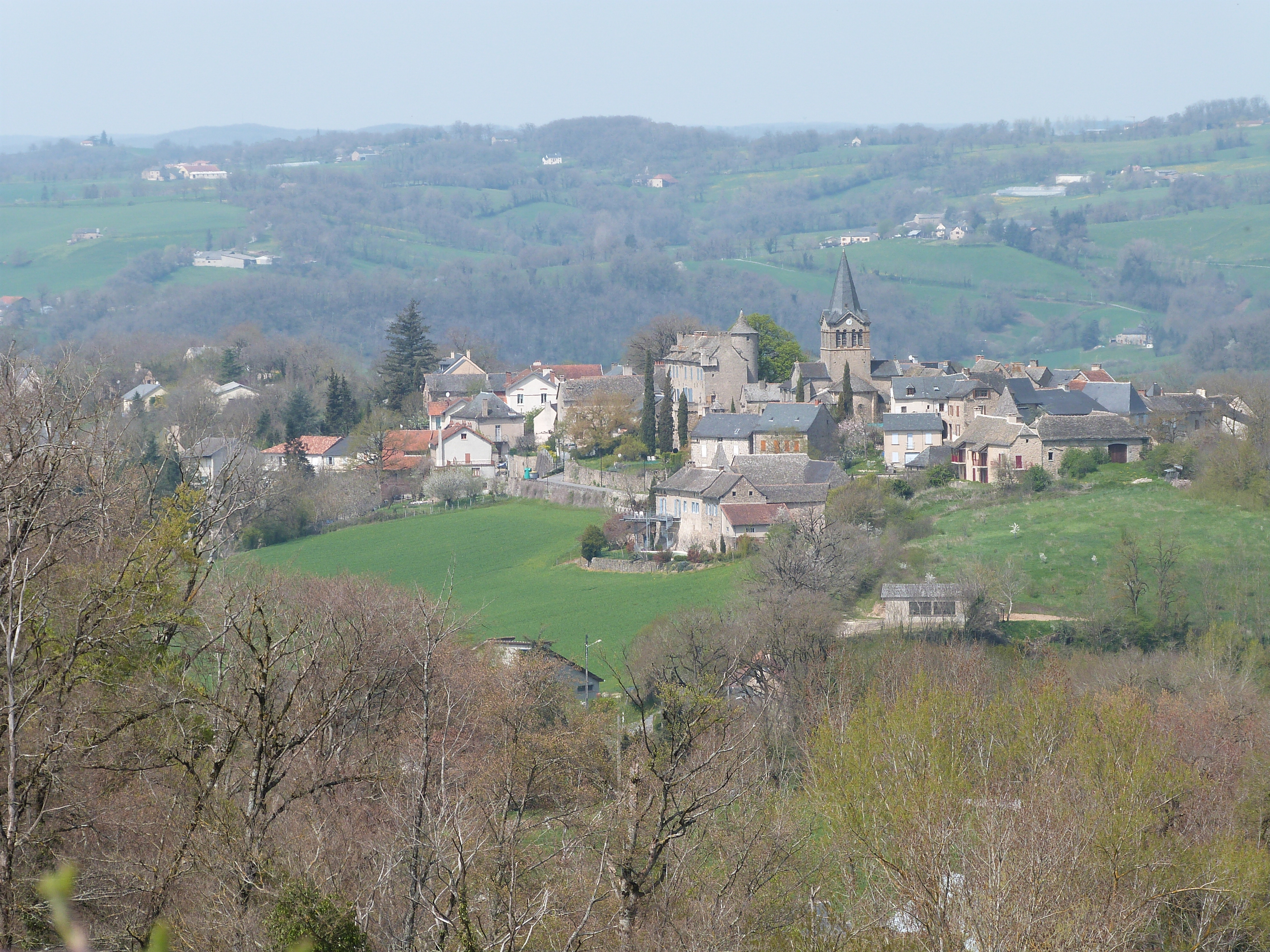 Vue d'ensemble du village aveyronnais de Lunac